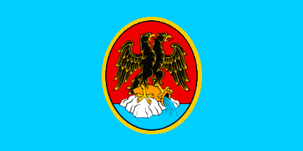 Rijeka. Huidige vlag van Rijeka.